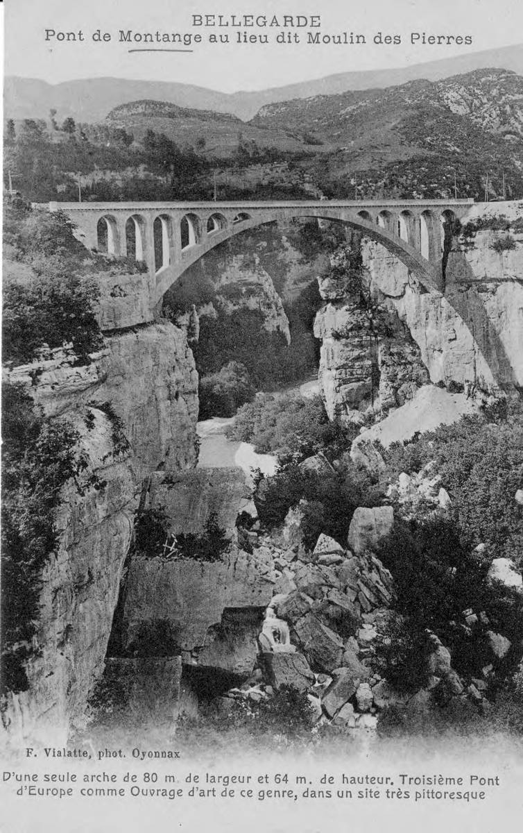 Le pont des pierres qui enjambe la Valserine entre Confort et Montanges (Ain)